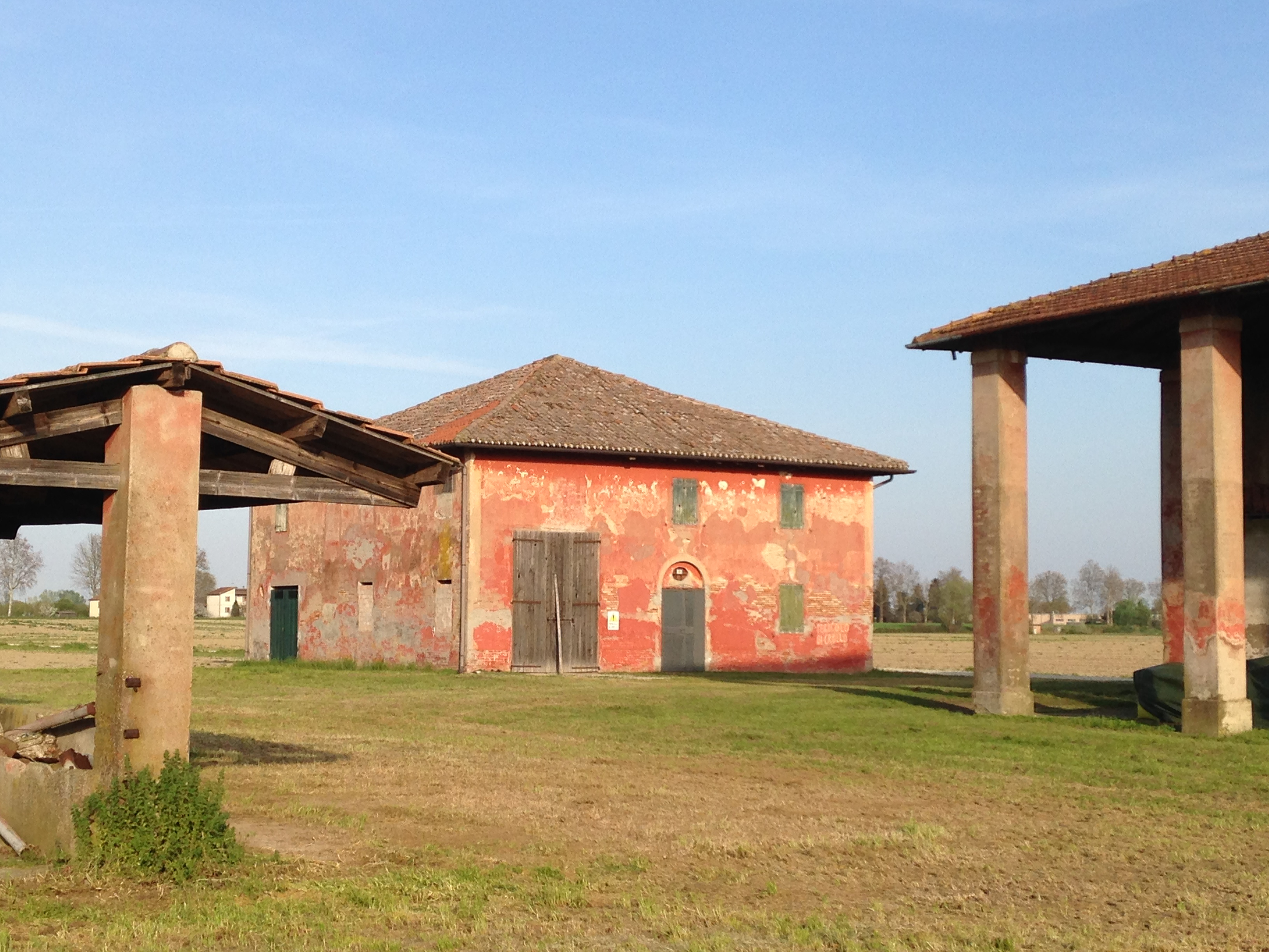 Casa Colonica fine XVIII secolo, Molinella